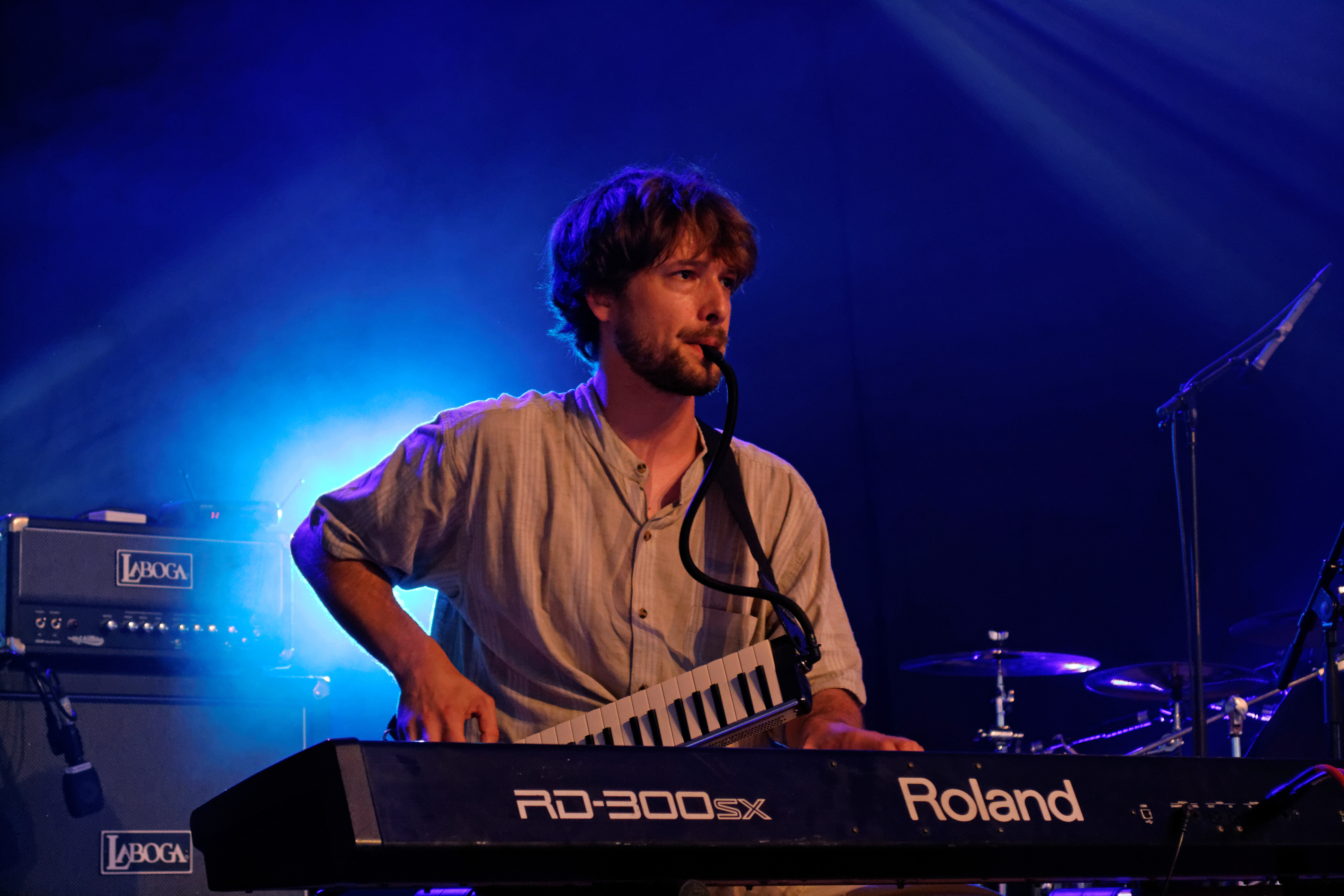 Arvest en fest-noz à l'espace Saint-Corentin lors du festival de Cornouaille le 24 juillet 2014.